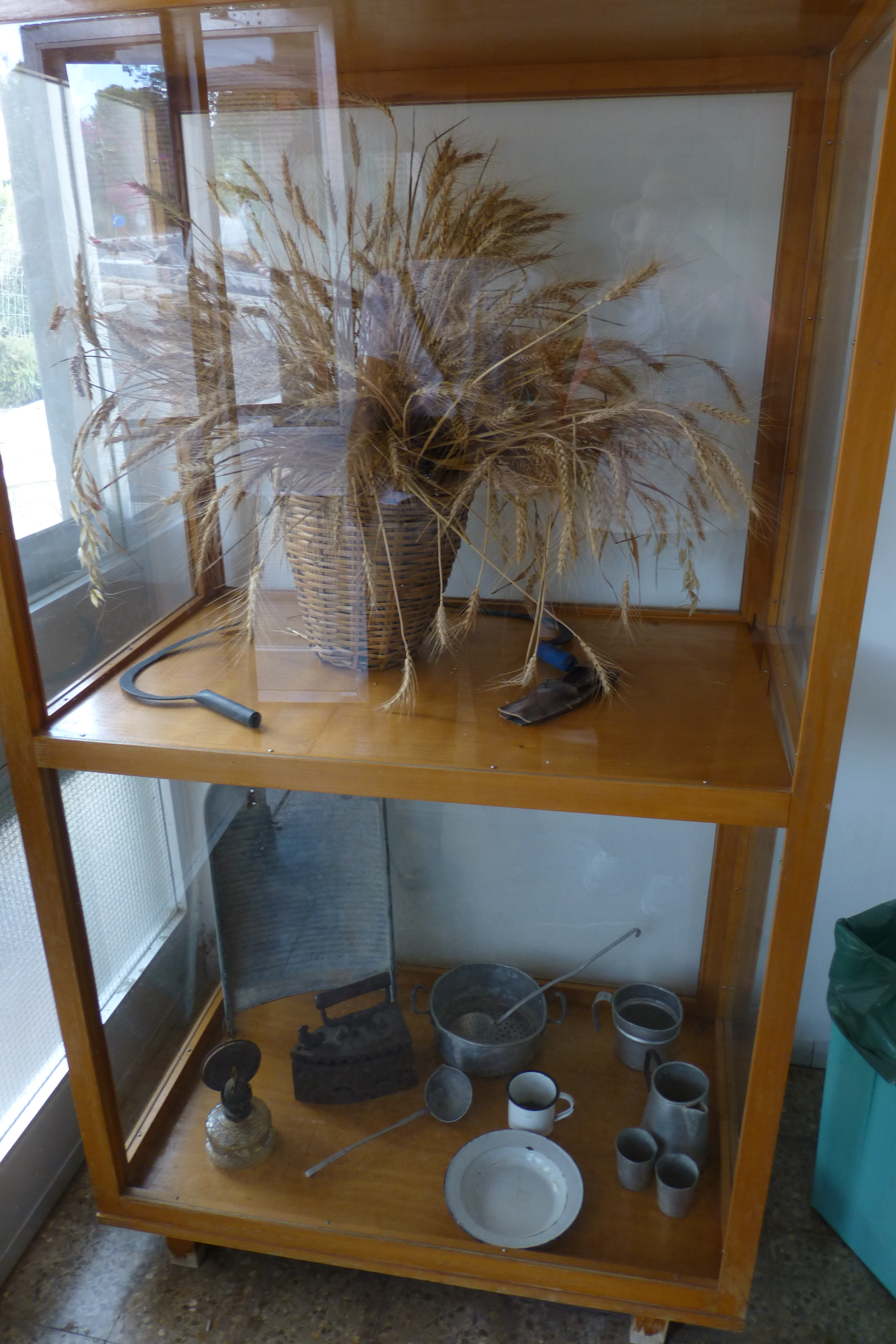 מוזיאון בית שטורמן המצוי בקיבוץ עין חרוד מאוחד נוסד בשנת 1941 על ידי חבר הקיבוץ שמואל סבוראי כמוזיאון לטבע.